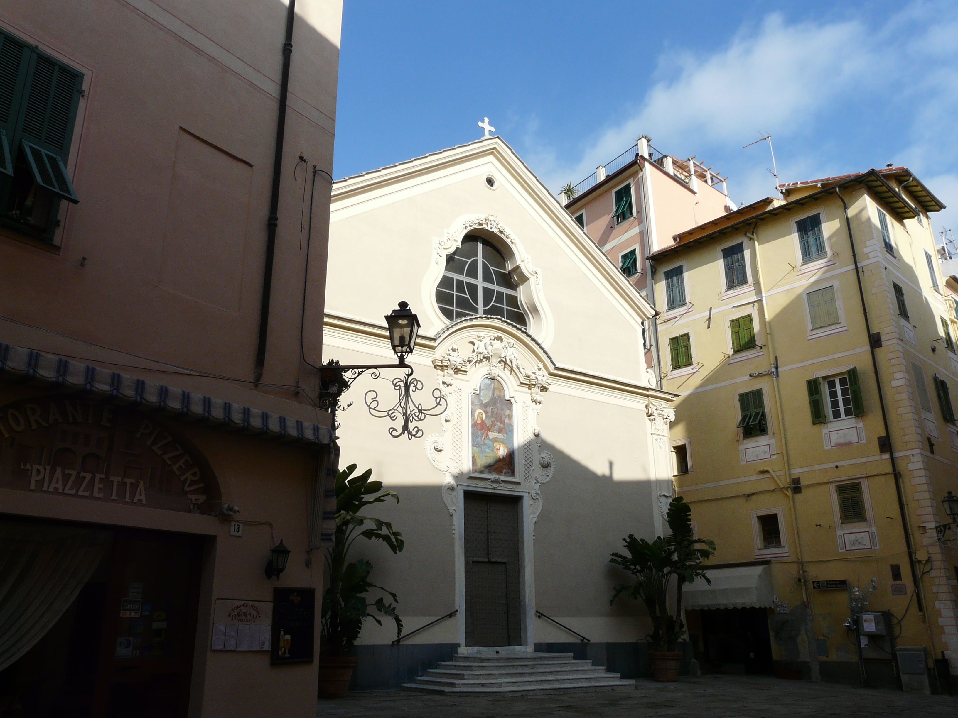 Chiesa di Santa Maria Maddalena di Bordighera, Liguria, Italia